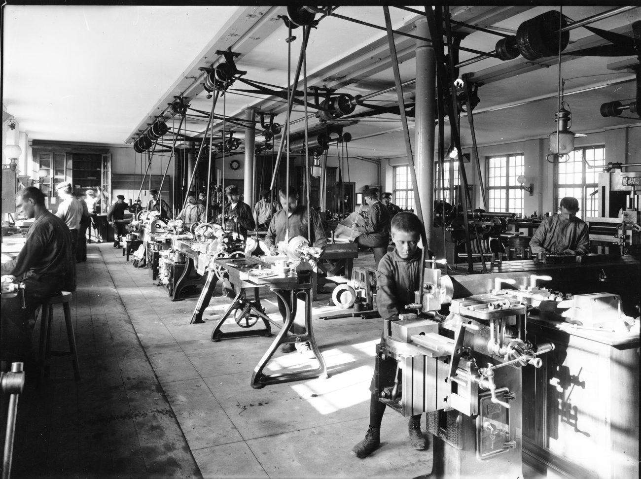 Interiör från Gustaf LM Ericssons Automobilfabrik. Arbetare vid maskinerna i verkstaden på på Arbetaregatan 4 (nuvarande Arbetargatan 32-34, kvarteret Ankaret), Kungsholmen, Stockholm. Pojken i förgrunden lär upp sig på kipphyvel, en lämplig nybörjarmaskin.